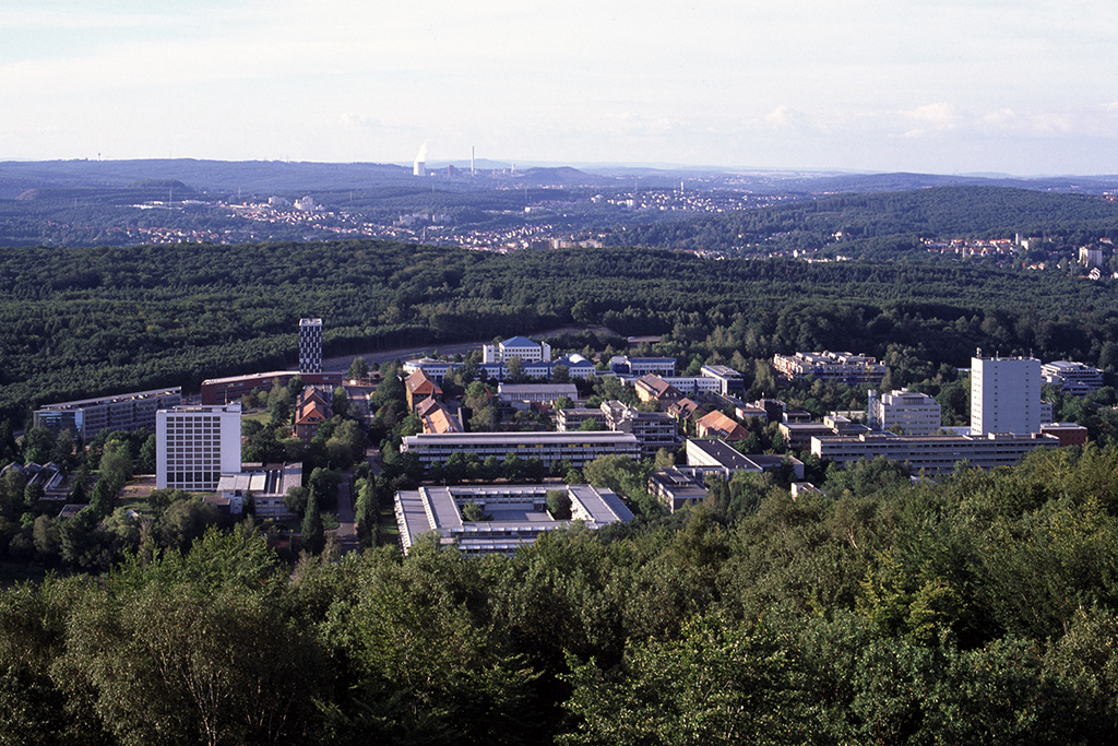 Campus der Uni Saarbrücken Anmerkungen